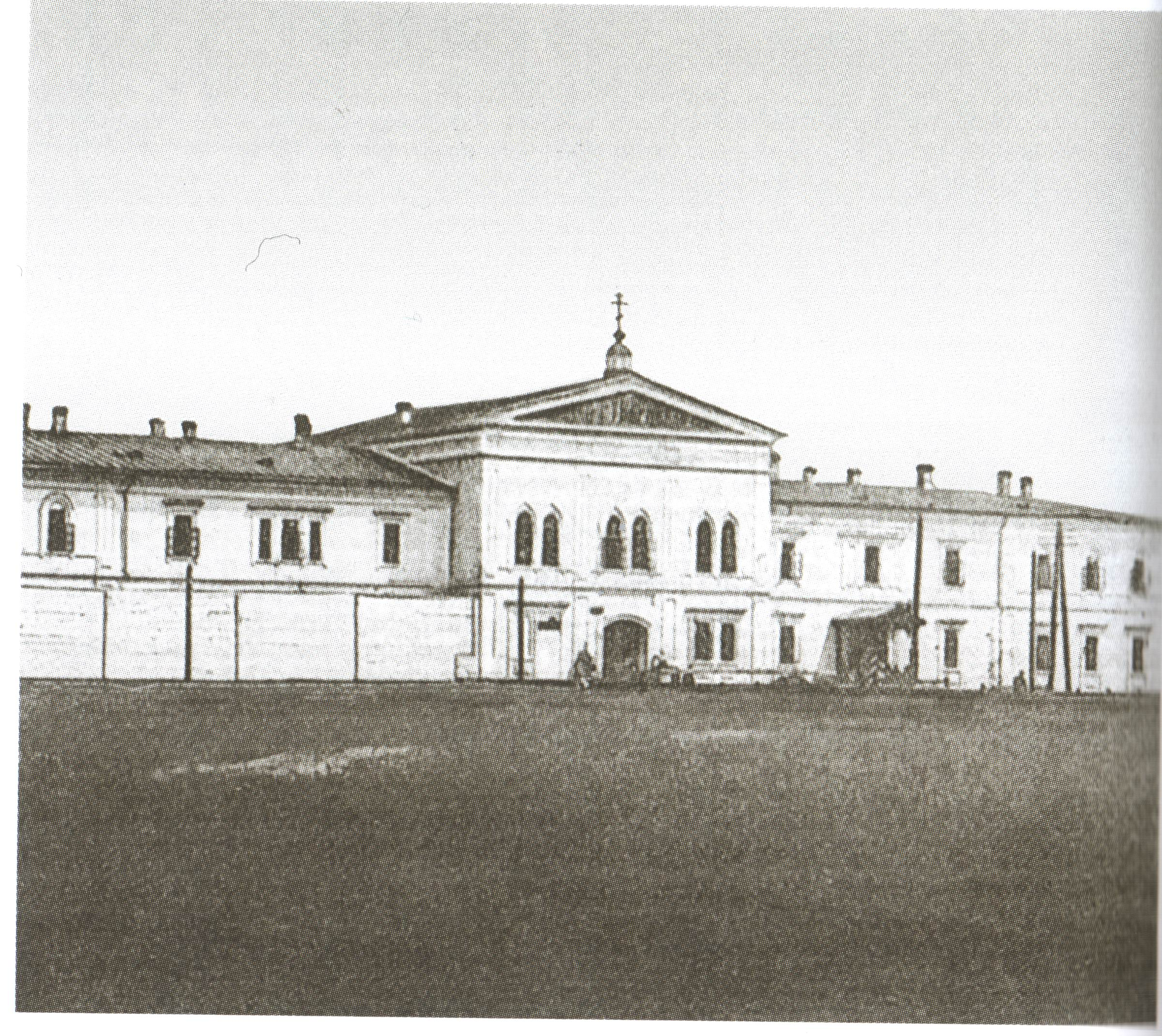 Иркутский тюремный замок -- последнее земное пристанище А.В. Колчака. Открытка начала XX века